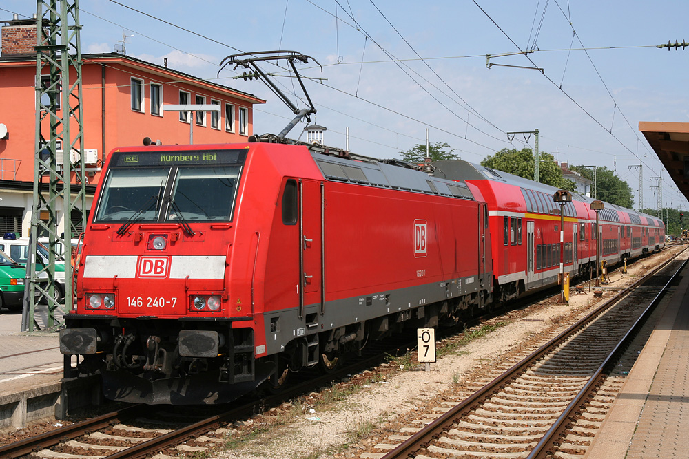 Lokomotive der BR 146 in Ingolstadt Hauptbahnhof